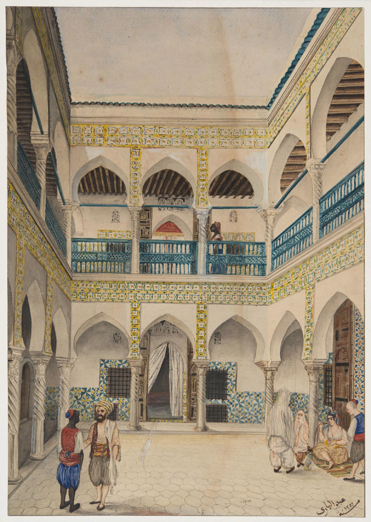 Cour intérieure d'une maison arabe à Alger, ABD AL-BÂRÎ, 1840-1841. Autre attribution RABIER. Aquarelle gouachée sur papier. Hauteur de la feuille en mm 385 ; Largeur de la feuille en mm 275. Signature en arabe en bas à droite, traduction : Abd al-Bârî, 1256 (de l'hégire soit 1840-1841). Numéro d'inventaire : Bx M 1532. Historique : - Ancienne collection BONIE, 173. Mode d'acquisition Legs Bonie, 1895. (Musée des Beaux-Arts - Mairie de Bordeaux. Cliché DEVAL, Frédéric)